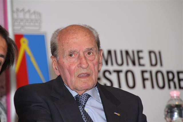 Alfredo Martini (Firenze, 18 febbraio 1921) è un ex ciclista su strada e dirigente sportivo italiano.